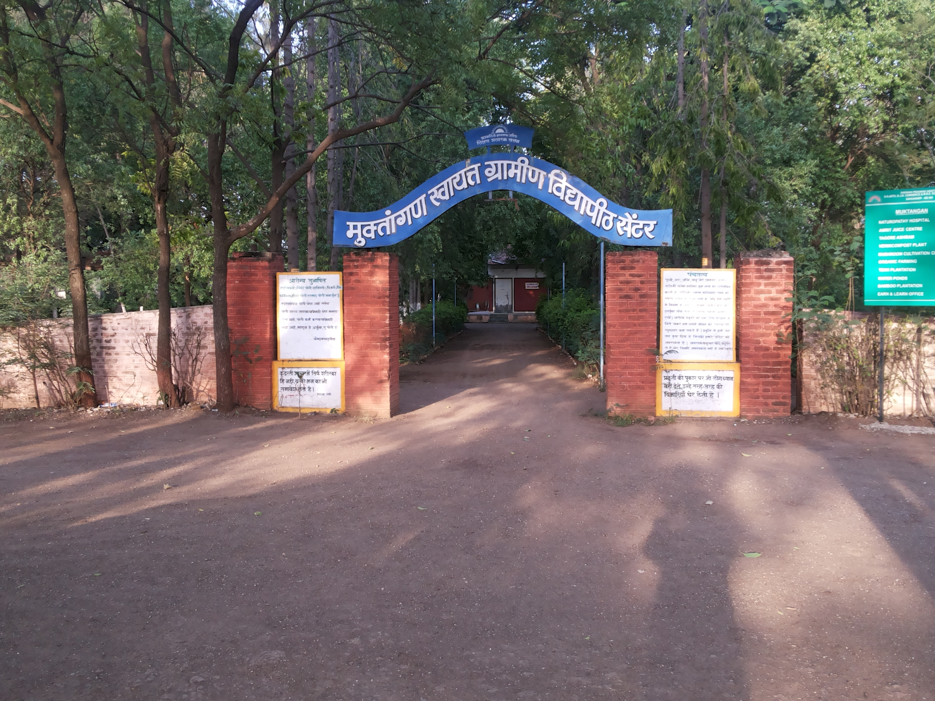 'मुक्तांगण 'चे प्रवेशद्वार